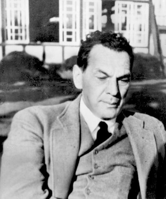 ADN-ZB / ZB / 3.10.85 / Zum 90. Geburtstag Richard Sorges am 4. Oktober Richard Sorge, der Kommunist, deutsche Revolutionär, Kundschafter der Roten Armee und hervorragende Publizist würde am 4. Oktober 1985 90 Jahre alt. Am 7. Oktober 1944 wurde er in Japan ermordet. (Relativ unbekanntes Foto aus dem Familienbesitz)